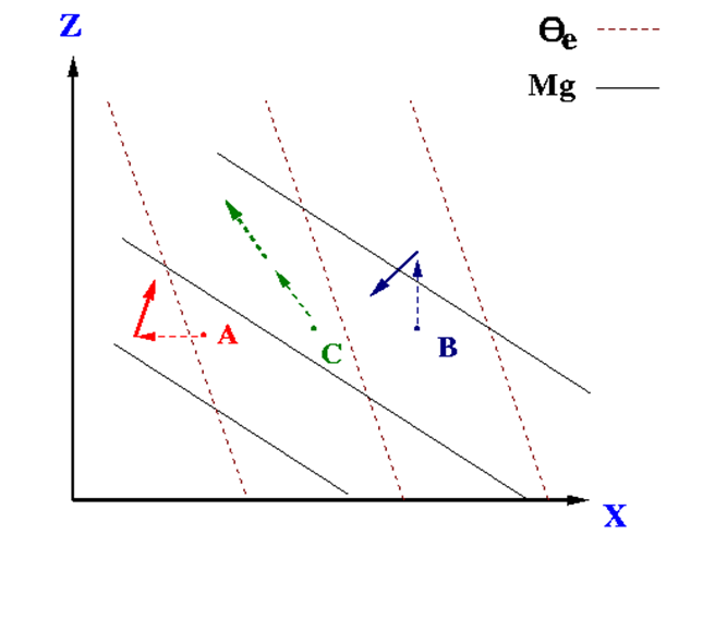 Déplacement d'une particule d'air par rapport aux lignes de moment cinétique (Mg) et de température potentielle équivalente. A est le cas où la particule est déplacé latéralement et revient à sont point de départ parce que sa quantité de mouvement est inférieure à celle du nouvel environnement (cas stable). B est le cas d'un déplacement vertical où la particule doit revenir à son état initial puisque la valeur de Theta e augmente avec la verticale (cas stable). C est le cas où la particule continue sont déplacement convectif.